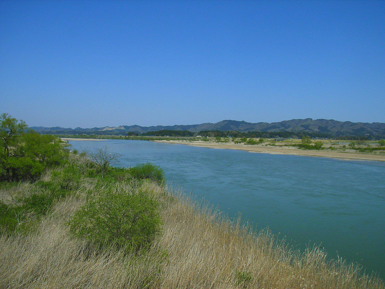 Abukuma River, Kakuda, Japan.